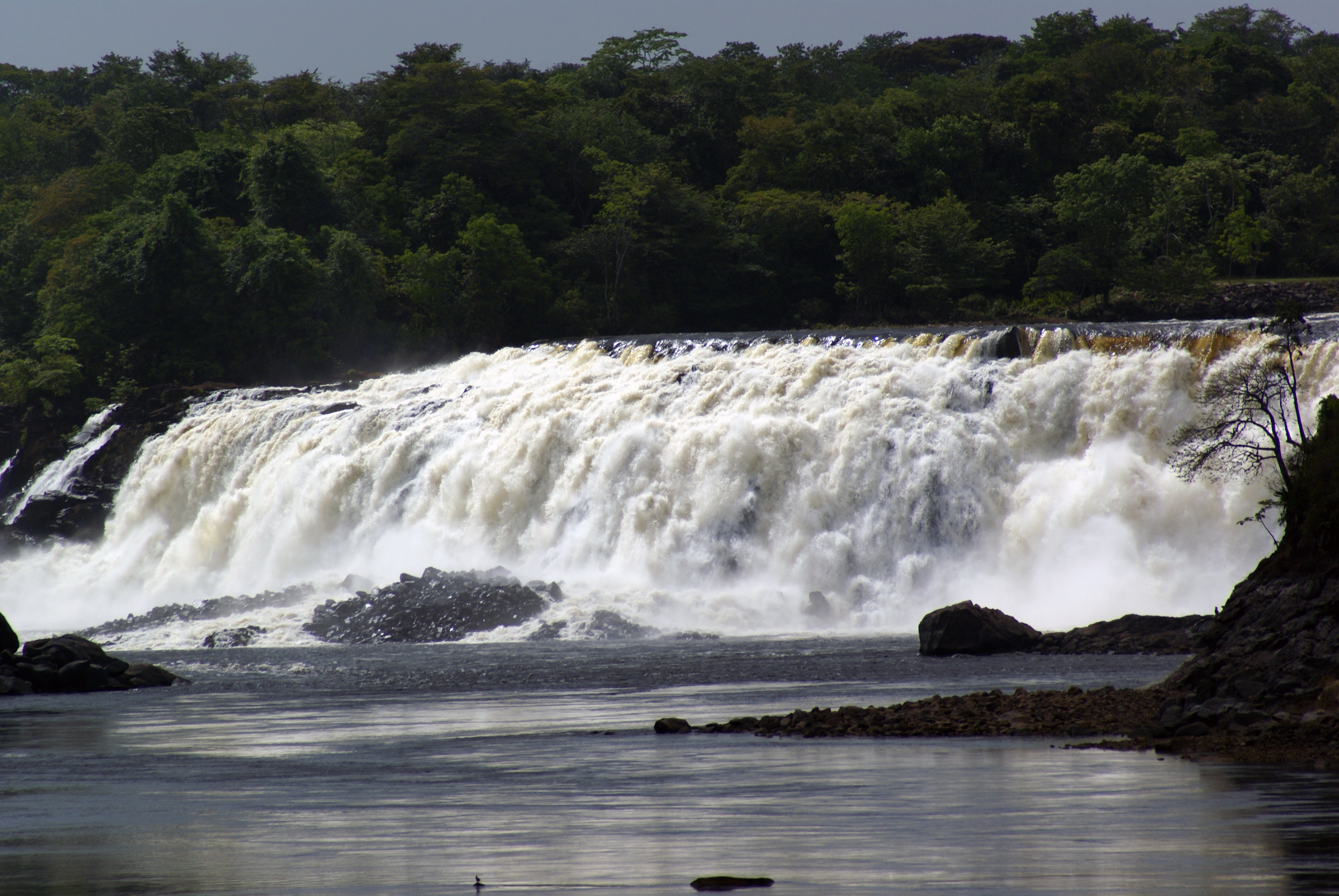 Vista del Salto La Llovizna desde el Hotel Intercontinental.